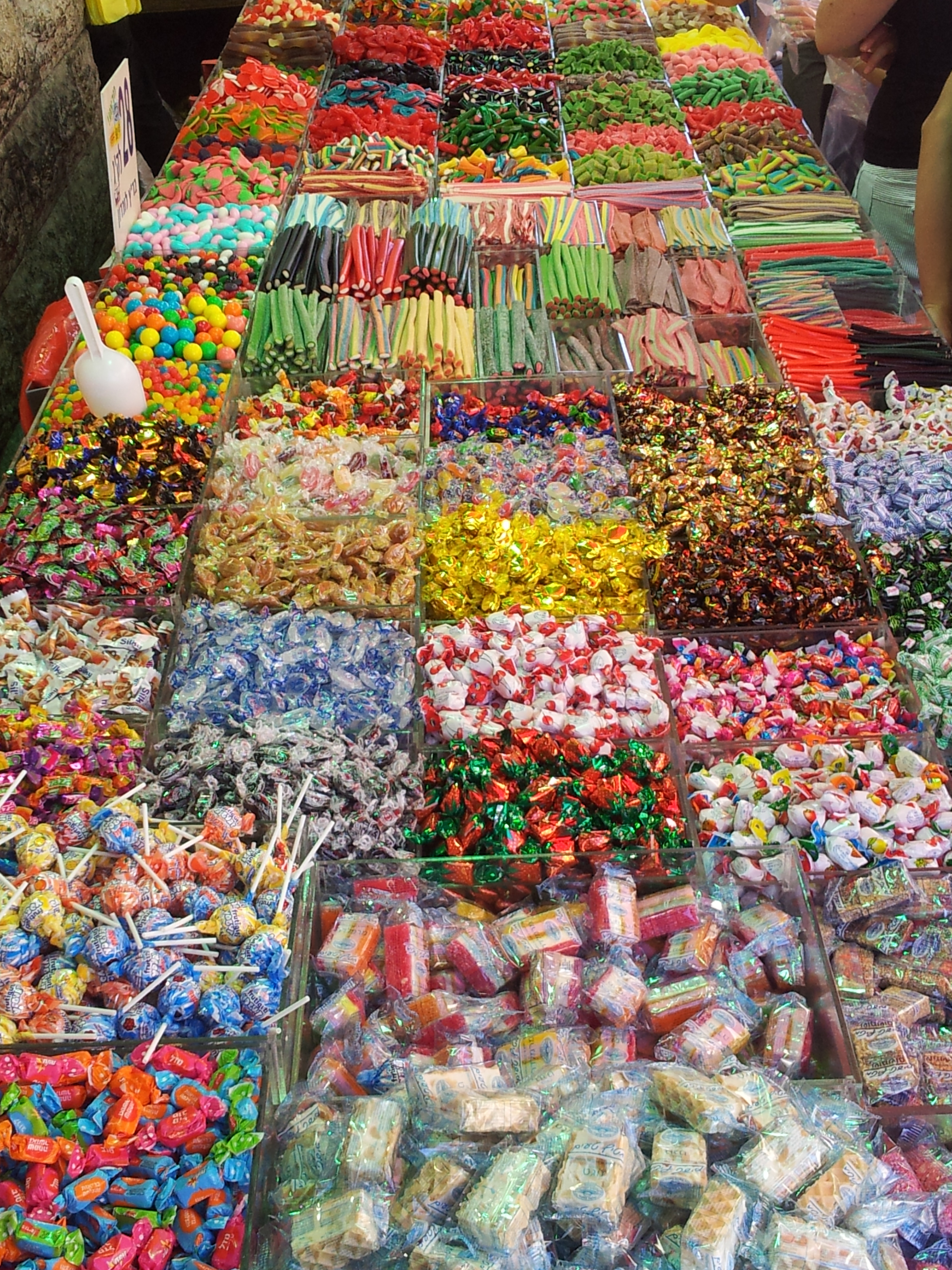 דוכן ממתקים